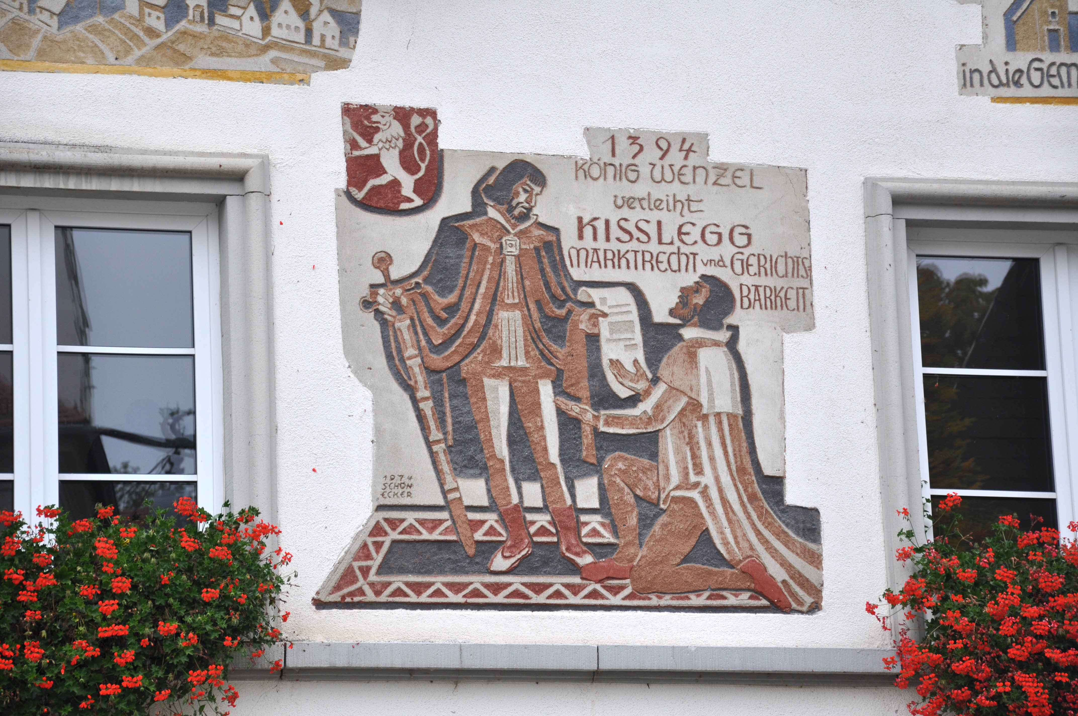 Kißlegg, Rathaus, Sgraffito von Toni Schönecker (1974) zur Kißlegger Geschichte